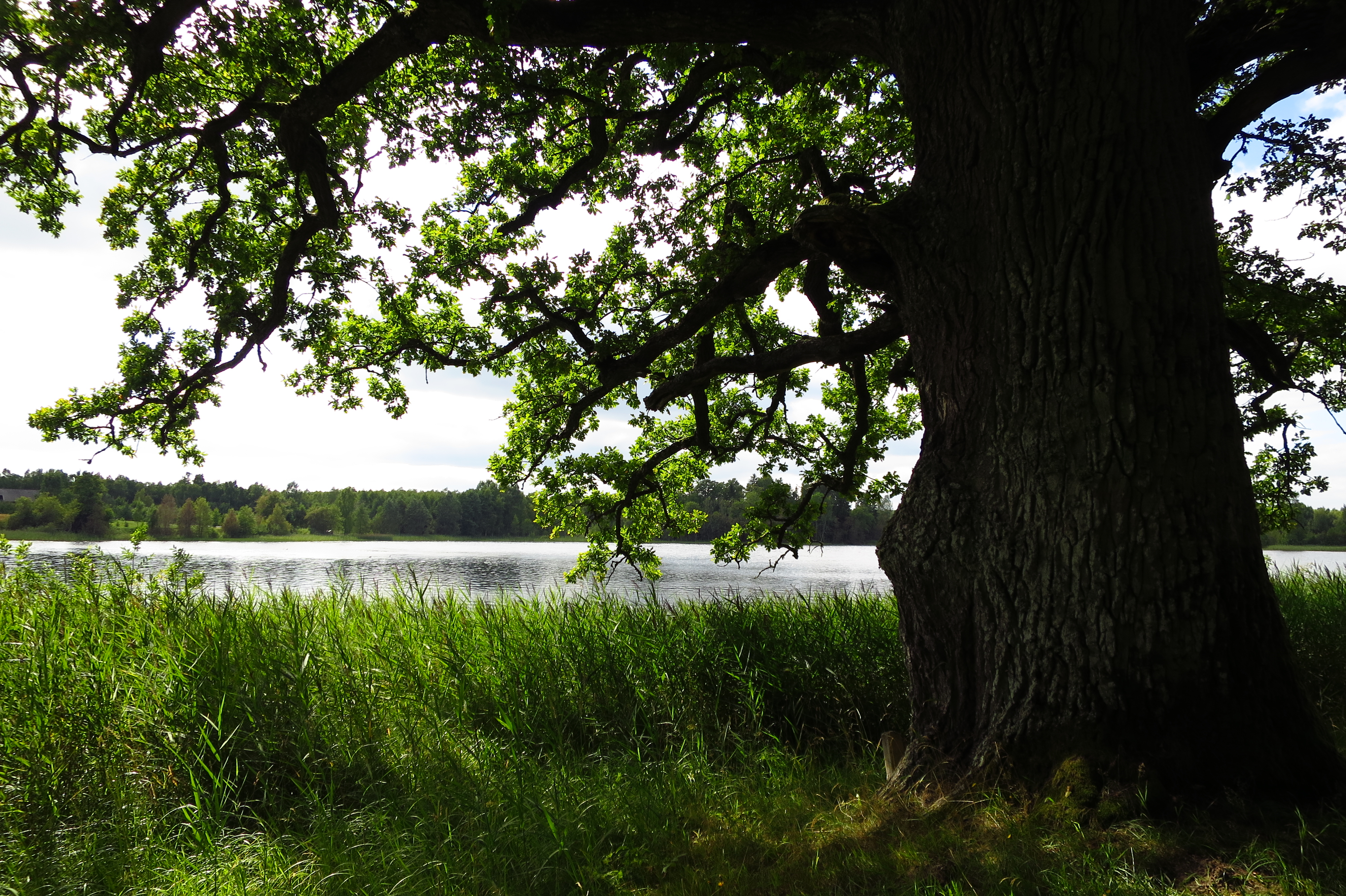 Valgejärve tamm Otepää Valgjärve ääres Valgjärve mõisa metsapargis